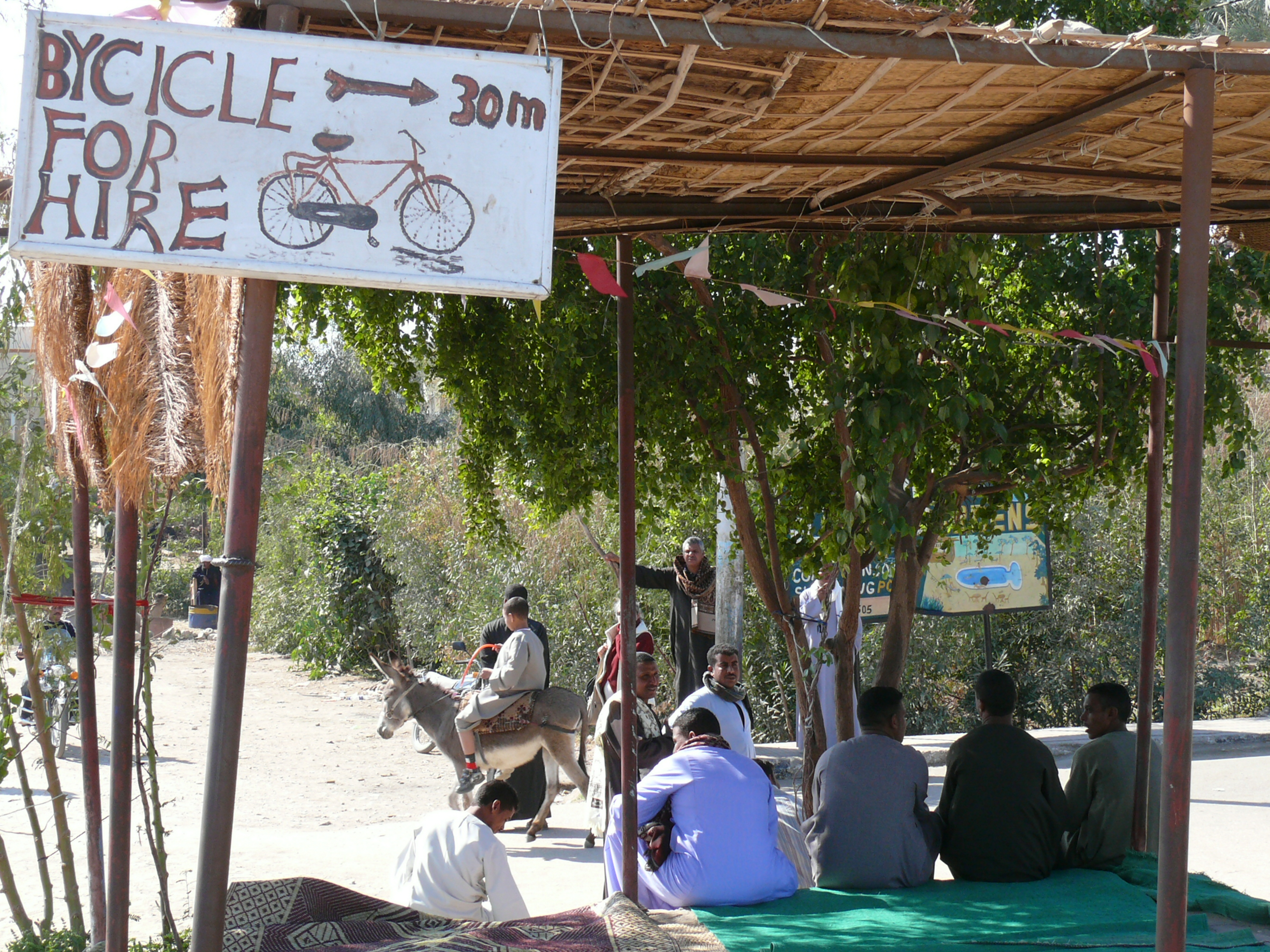 Gebetsstätte bei Luxor